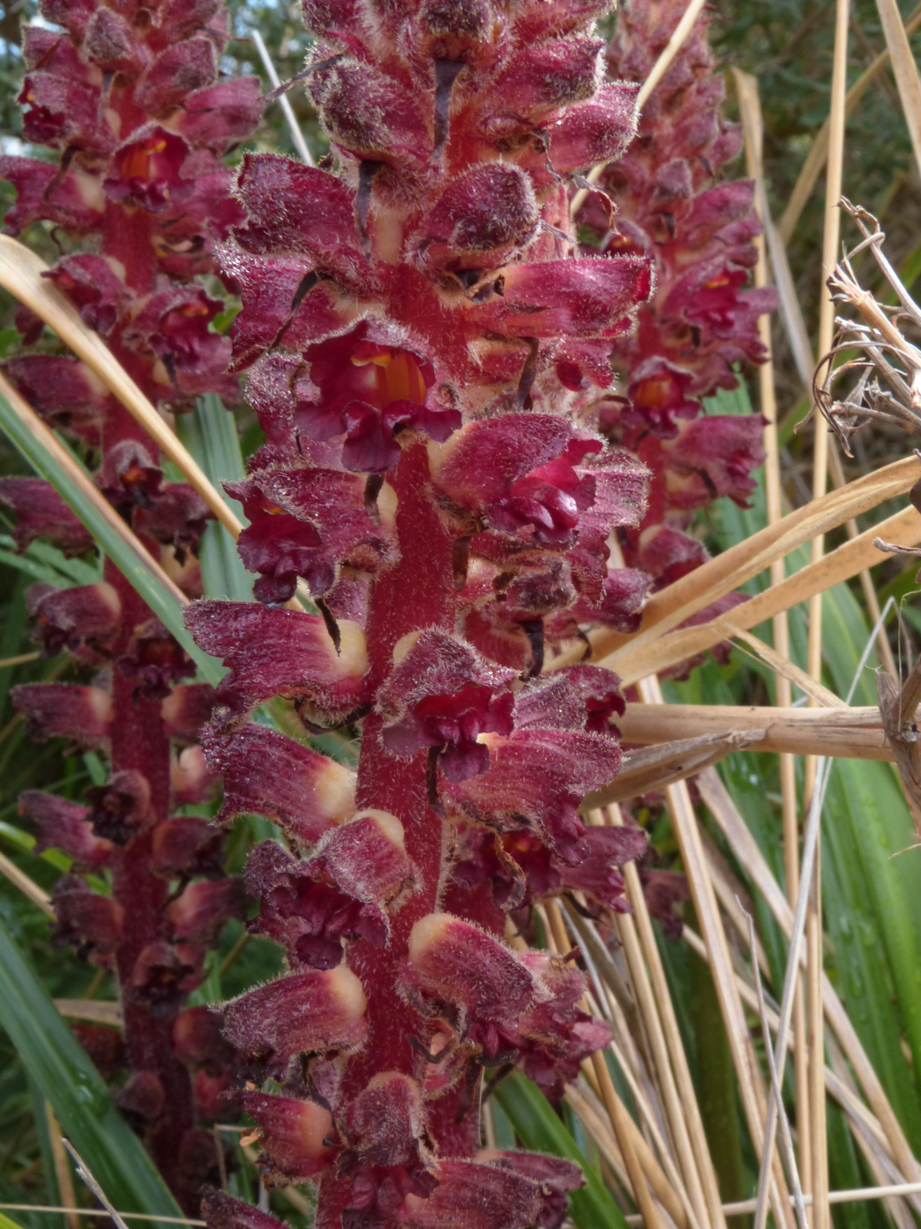 Sommerwurz